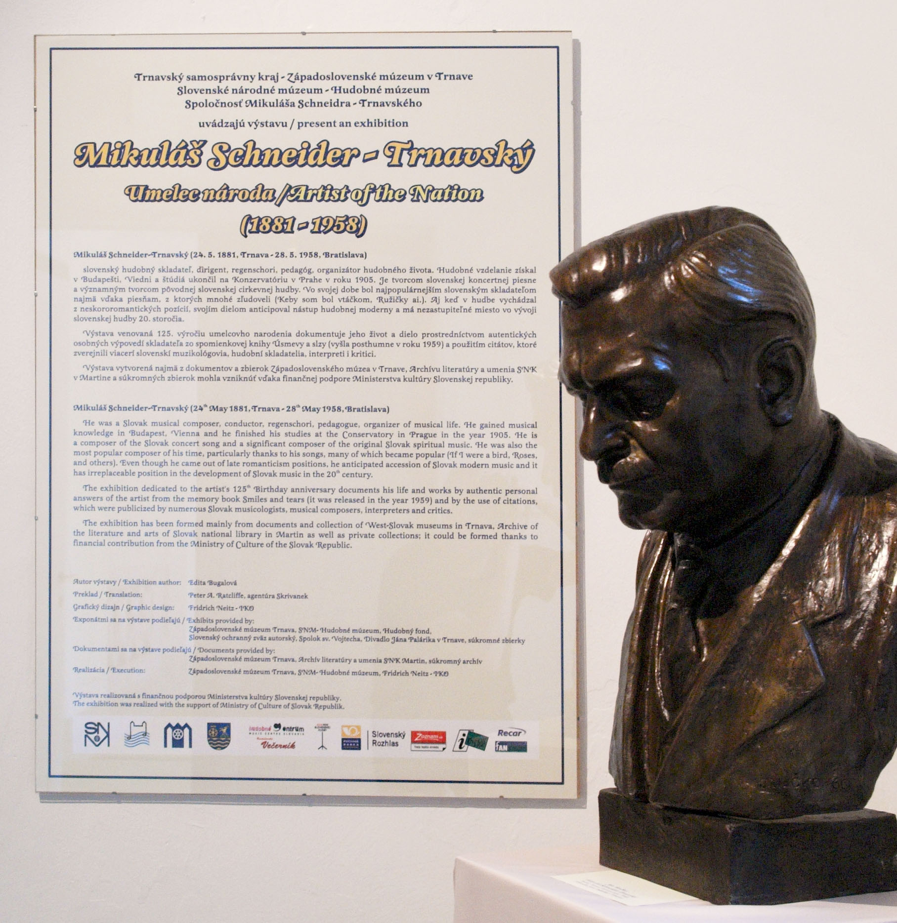 Výstava Mikuláš Schneider-Trnavský - umelec národa